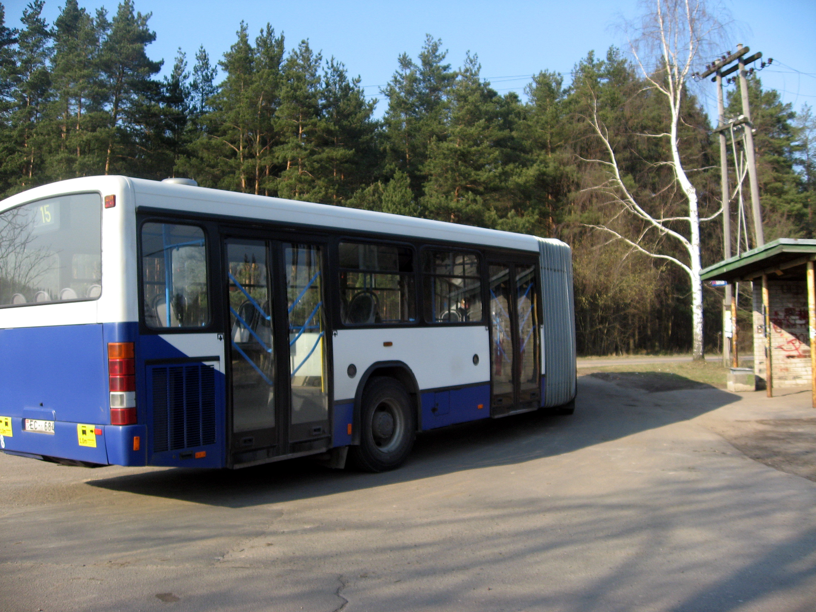 Dārziņi, konečná.